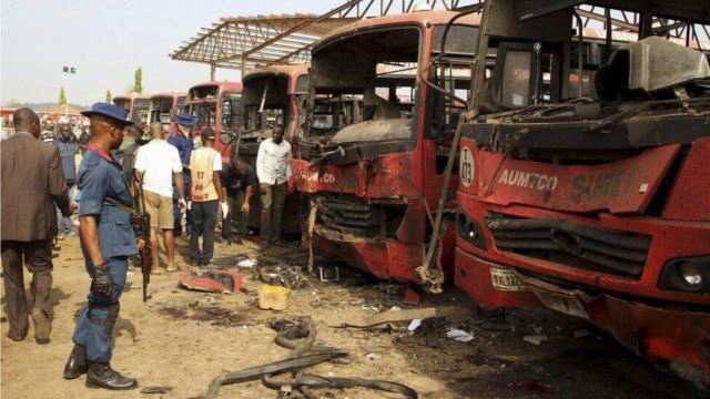 Attentat à Nyanya par Boko Haram le 14 avril 2014.